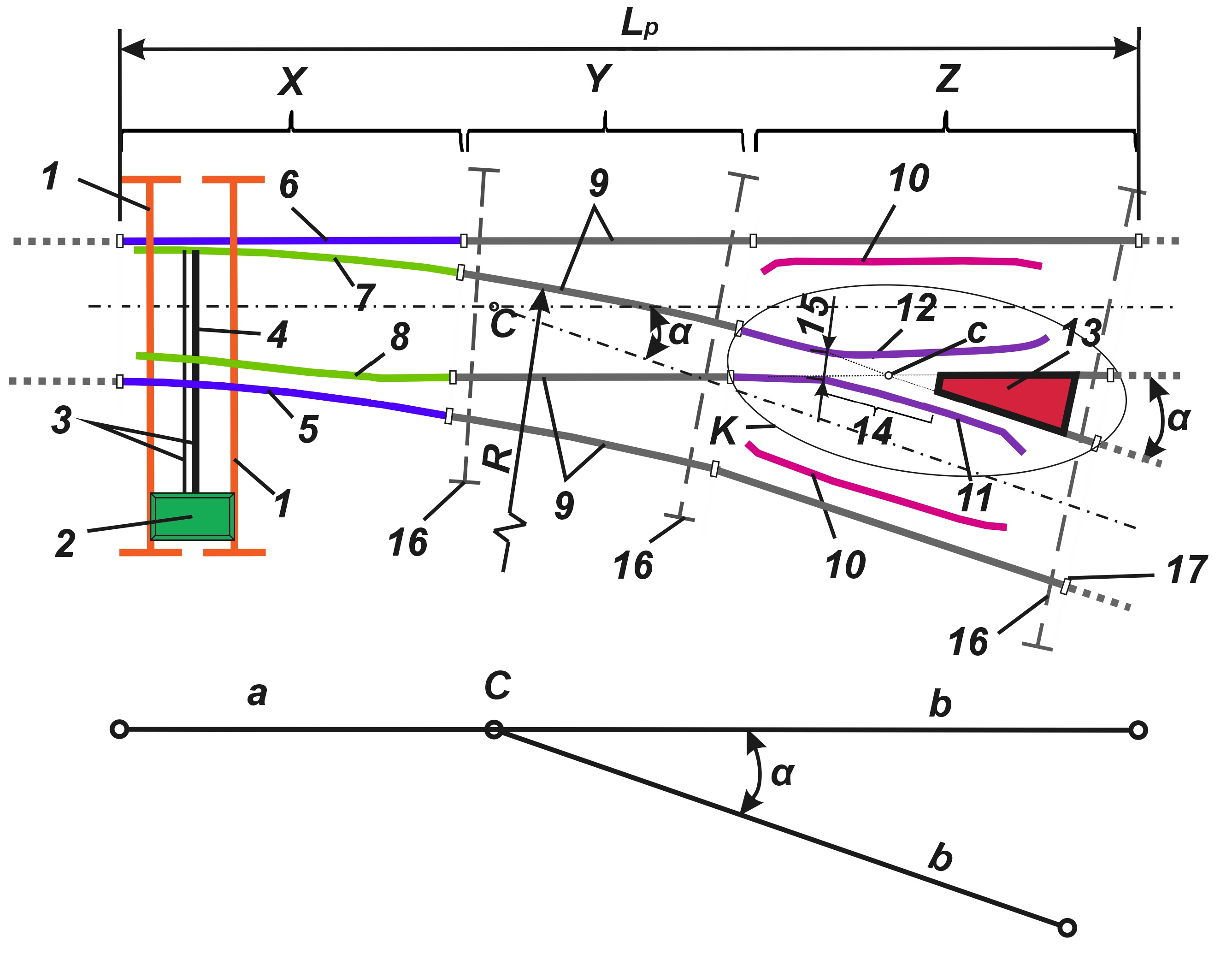 Vienkāršās pārmiju pārvedas shēma: Lp – pārmiju pārvedas pilns garums; X – pārmijas daļa; Y – vidus daļa; Z – krusteņa daļa; K – krusteņa komplekts; C – pārmiju pārvedas matemātiskais centrs; c – smaila krusteņa matemātiskais centrs; α – pārmiju pārvedas, kā arī smaila krusteņa leņķis; a – attālums no pārmiju pārvedas sakuma līdz pārmiju pārvedas matemātiskajam centram C pa taisnā ceļa asi; b – attālums no pārmiju pārvedas matemātiskā centra C līdz pārmiju pārvedas beigām taisnā un sānu virzienā; Lp=a+b; 1 – pārmijas piedziņas brusa; 2 – pārmijas motors vai pārvedmehānisms; 3 – darba un kontrolvilktņi; 4 – starpasmeņu un darba vilktņi; 5 – rāmjsliede līkā; 6 – rāmjsliede taisnā; 7 – asmens līkais; 8 – asmens taisnais; 9 - ceļa sliede; 10 – pretsliede; 11 – spārnsliede labā; 12 – spārnsliede kreisā; 13 – krusteņa serde; 14 – krusteņa kaitīgā telpa; 15 – krusteņa kakls; 16 – pārmiju pārvedas brusa vai cits zemsliežu pamats; 17 – sliežu salaidne vai sliežu metinājuma šuve.